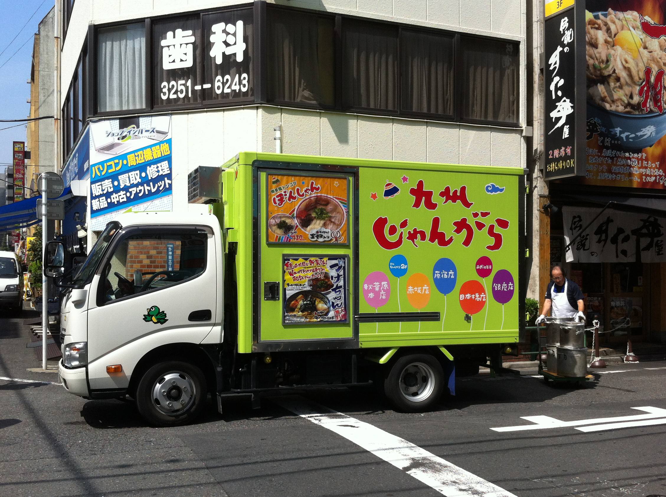 九州じゃんがらラーメンの配送車両